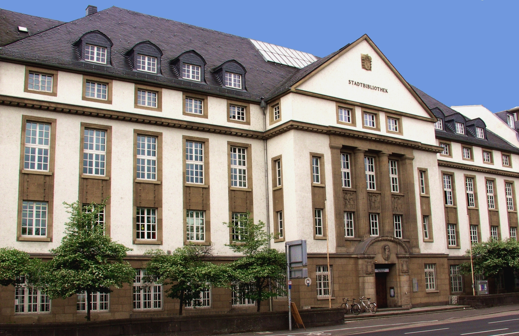 Aussensicht der Wissenschaftlichen Stadtbibliothek Mainz im Jahre 2006.